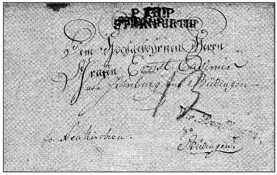 Stempel aus der französischen Zeit "P 131 P / Steinfurt" für einen bezahlten Brief, mit Nebenstempel "Sous Prefekt"